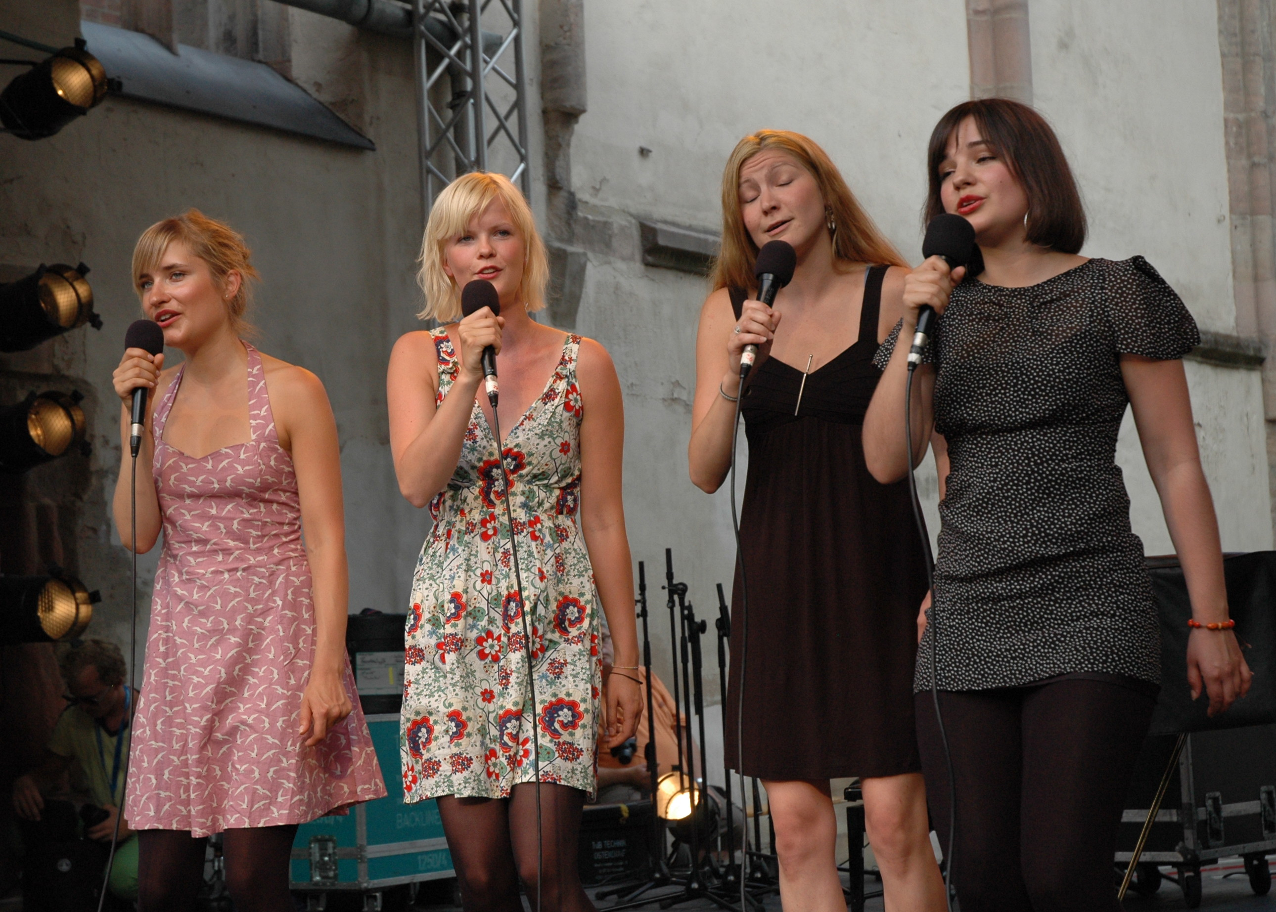 Kraja beim 34. Bardentreffen in Nürnberg. Von links nach rechts: Lisa Lestander, Frida Johansson, Linnea Nilsson, Eva Lestander.